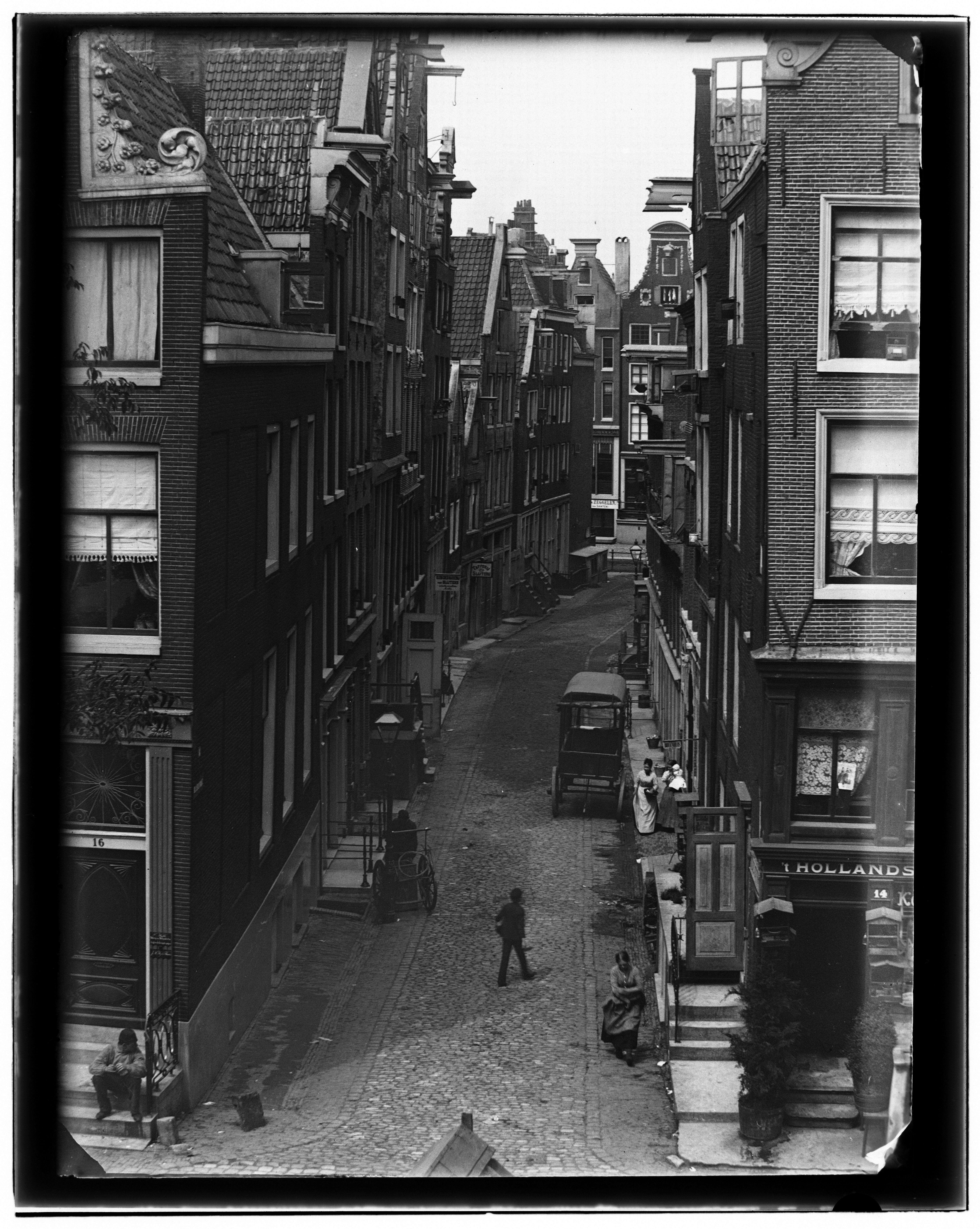 Beschrijving Bloedstraat 2 t/m 26 (v.r.n.l.``,links) Gezien vanaf Nieuwmarkt met hoekhuis nr.14 (rechts) naar Oudezijds Achterburgwal Documenttype foto Vervaardiger Olie``, Jacob (1834-1905) Collectie Collectie Jacob Olie Jbz. Datering 1890 Geografische naam Bloedstraat Inventarissen Afbeeldingsbestand 10019A000145 Generated with Dememorixer